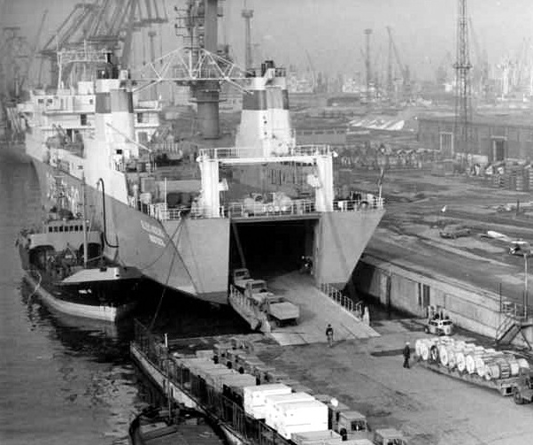 Factual corrections and alternative descriptions are encouraged separately from the original description. Additionally errors can be reported at this page to inform the Bundesarchiv. Original historic description: Rostock, Überseehafen, Ro-Ro-Schiff, Ro-Ro-Umschlag, LKWs ADN-ZB Sindermann 1.3.83 Rostock: Auf die erhöhten Anforderungen im Schiffahrtsliniendienst Rostock-Riga stellen sich die Reedereien in der DDR und der UdSSR mit dem Einsatz des Ro-Ro-Schiffs "Gleichberg" ein. Das in Wismar gebaute Schiff wird ebenso planmäßig verkehren wie die sowjetischen auf dieser Linie. Diese Maßnahme soll mit dazu beitragen, den 1983 um rund ein Viertel der Vorjahresleistung ansteigenden Containertransport besser zu bewältigen und mehr Güter auf rollenden Ladeeinheiten zu befördern.